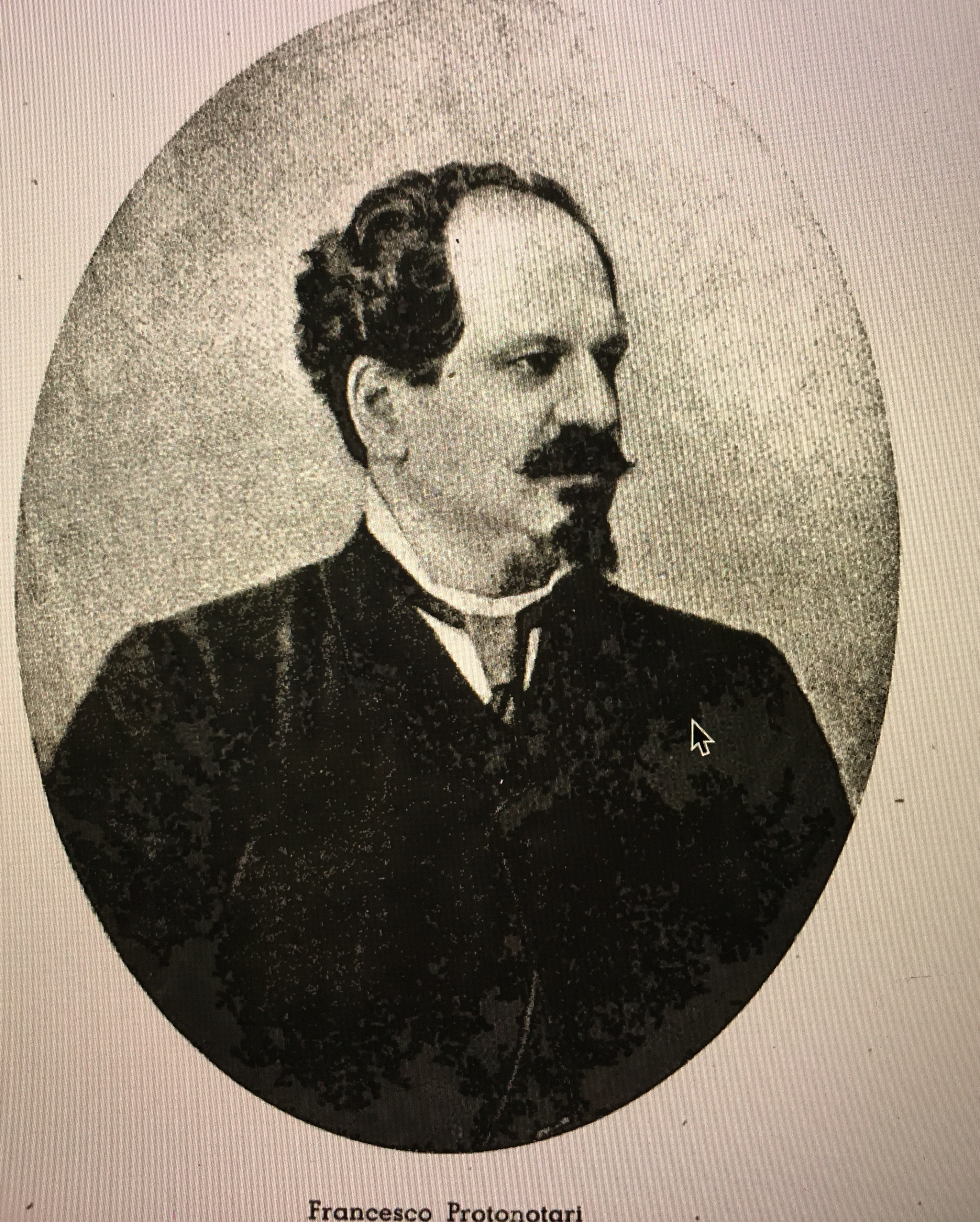 Francesco Protonotari, fondatore di "La Nuova Antologia"